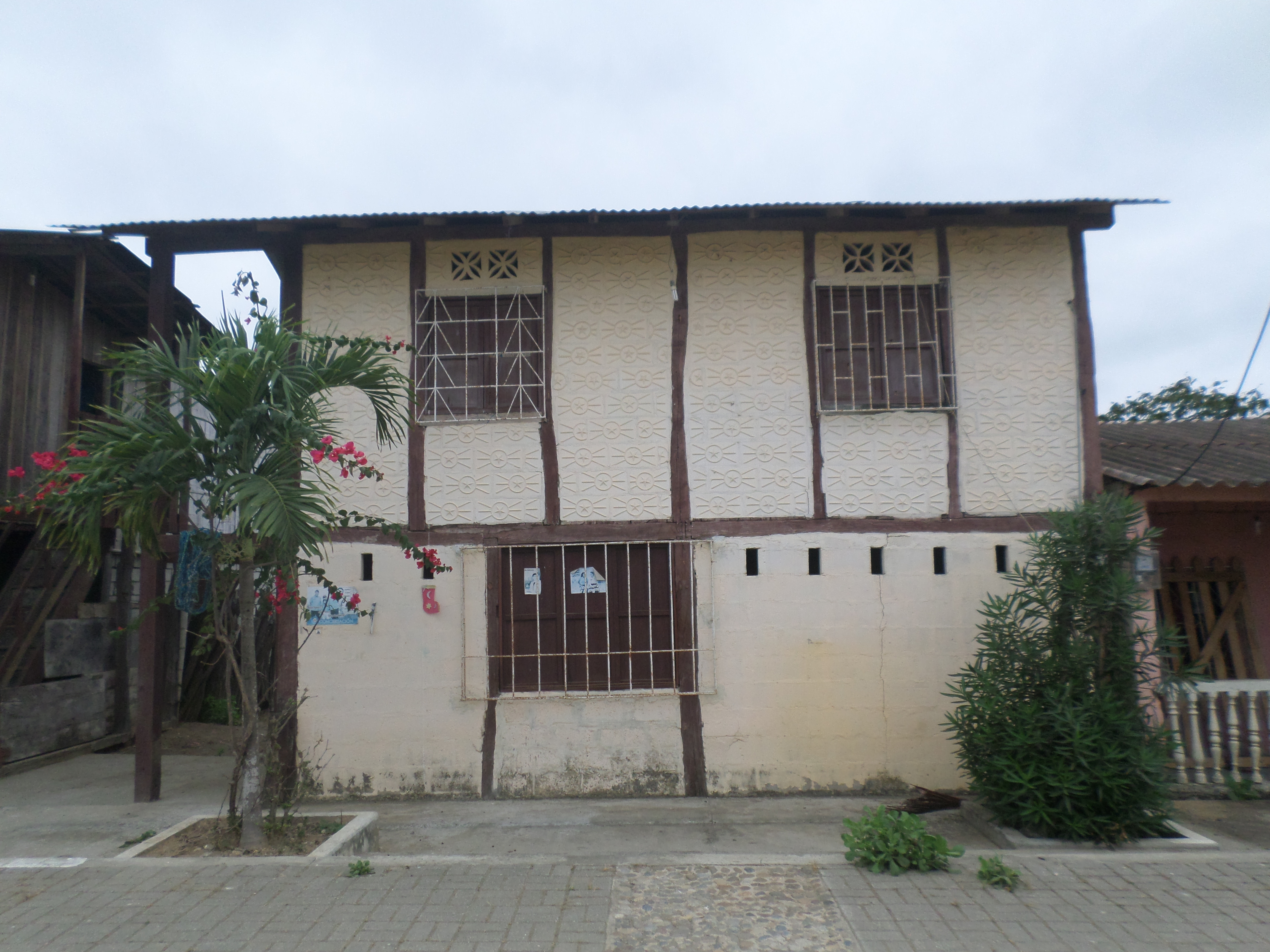 Vivienda típica de la Península